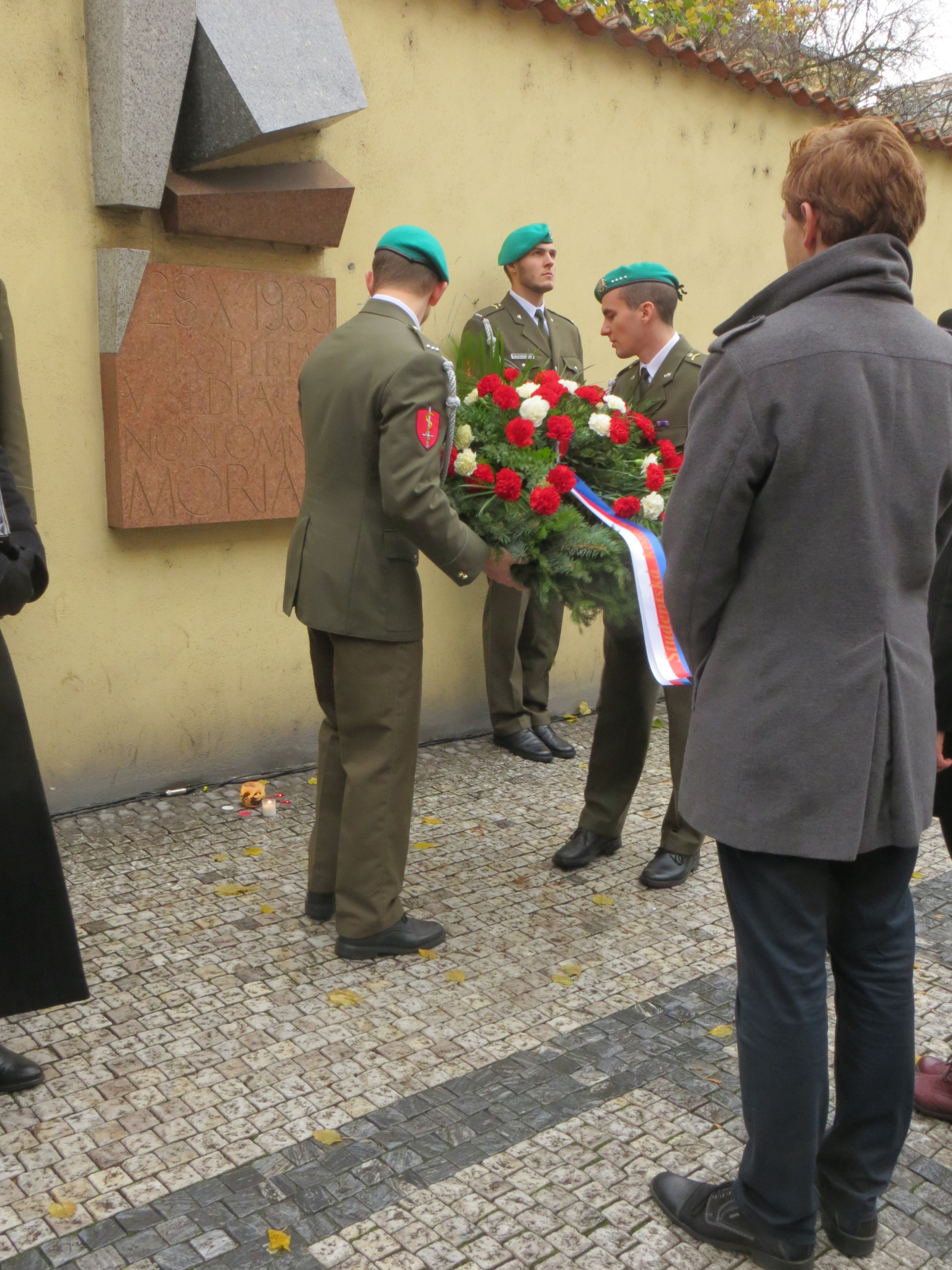 Vzpomínková slavnost k uctění památky Jana Opletala a Václava Sedláčka, zastřelených při demonstraci 28. října 1939.